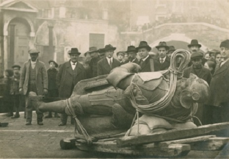 Arduino Colasanti, ispettore generale dei Monumenti, assiste allo smontaggio del monumento a Bartolomeo Colleoni.